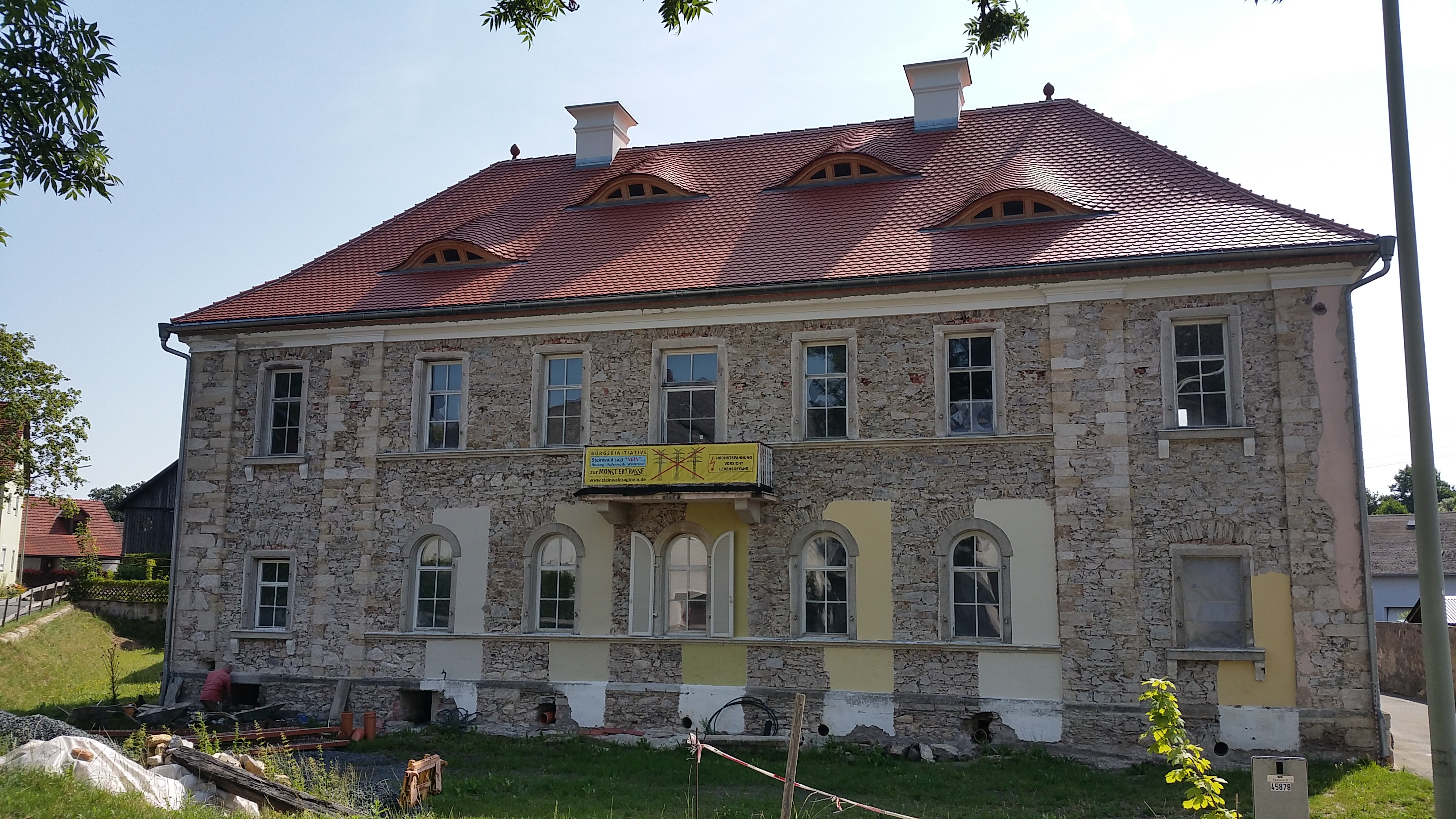 Ansicht Westseite des momentan unverputzten Hauptgebäudes mit Farbmuster für künftigen Fassadenanstrich.